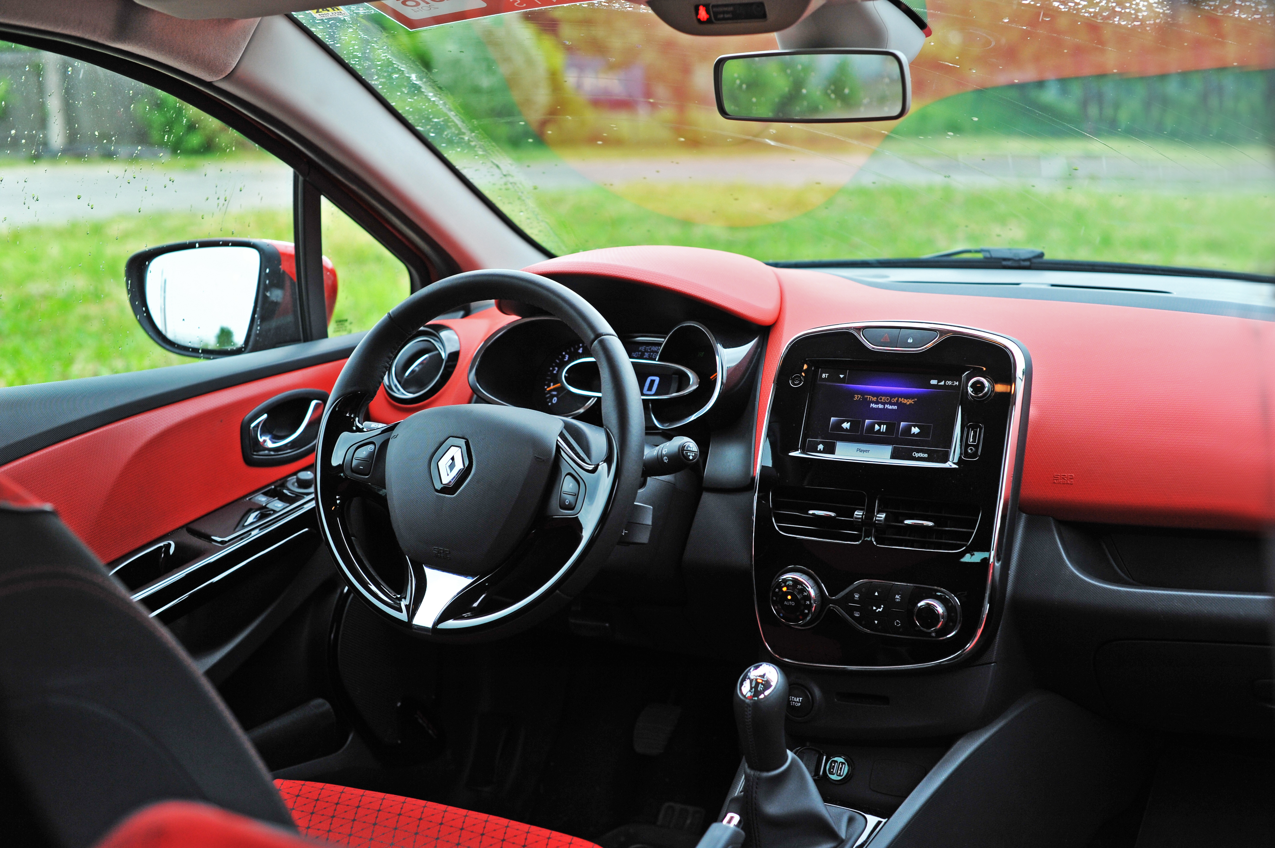 Attribution: Kaspars Garda, garda.lv